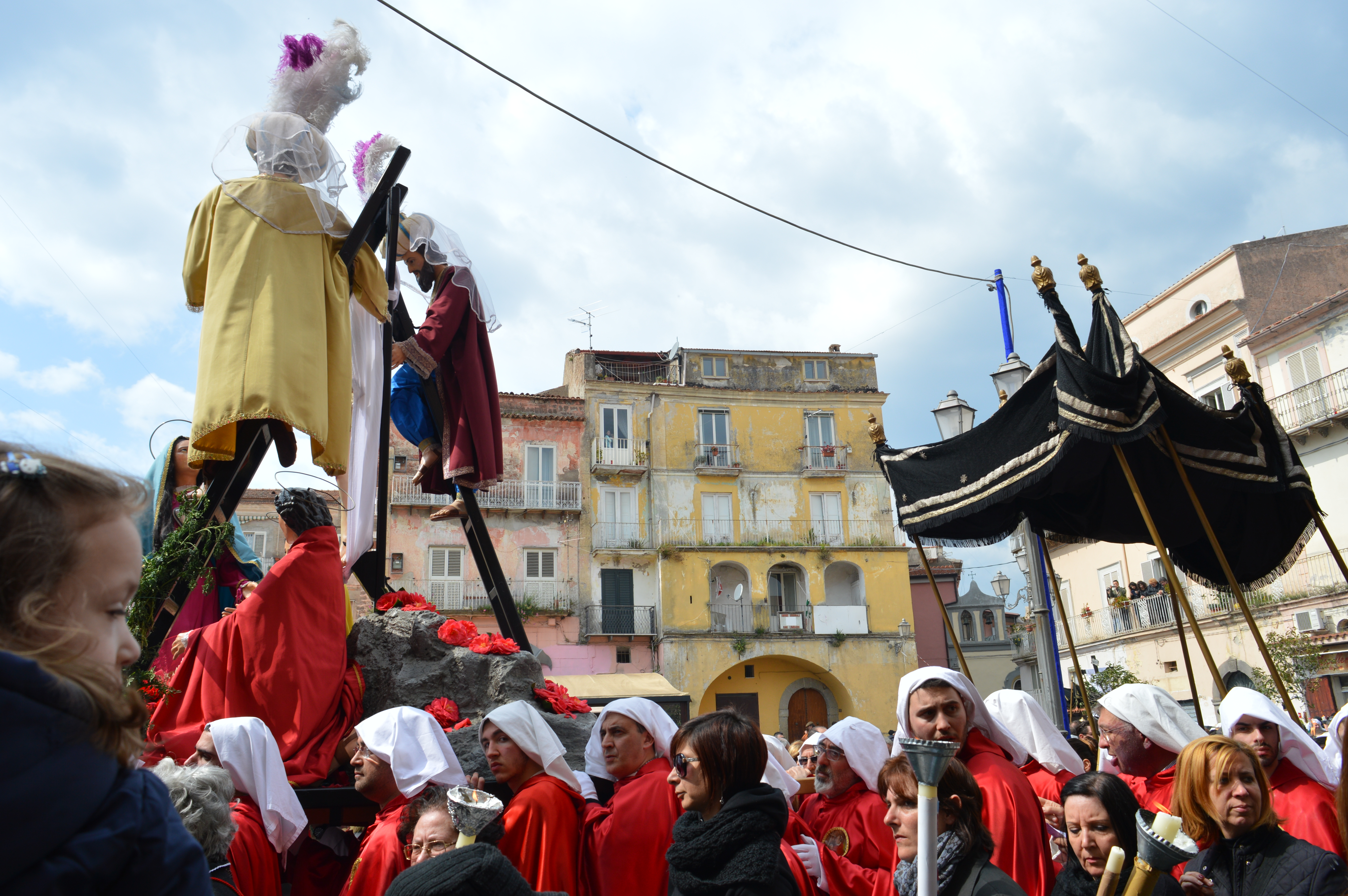 il corteo è giunto in piazza XX Settembre.